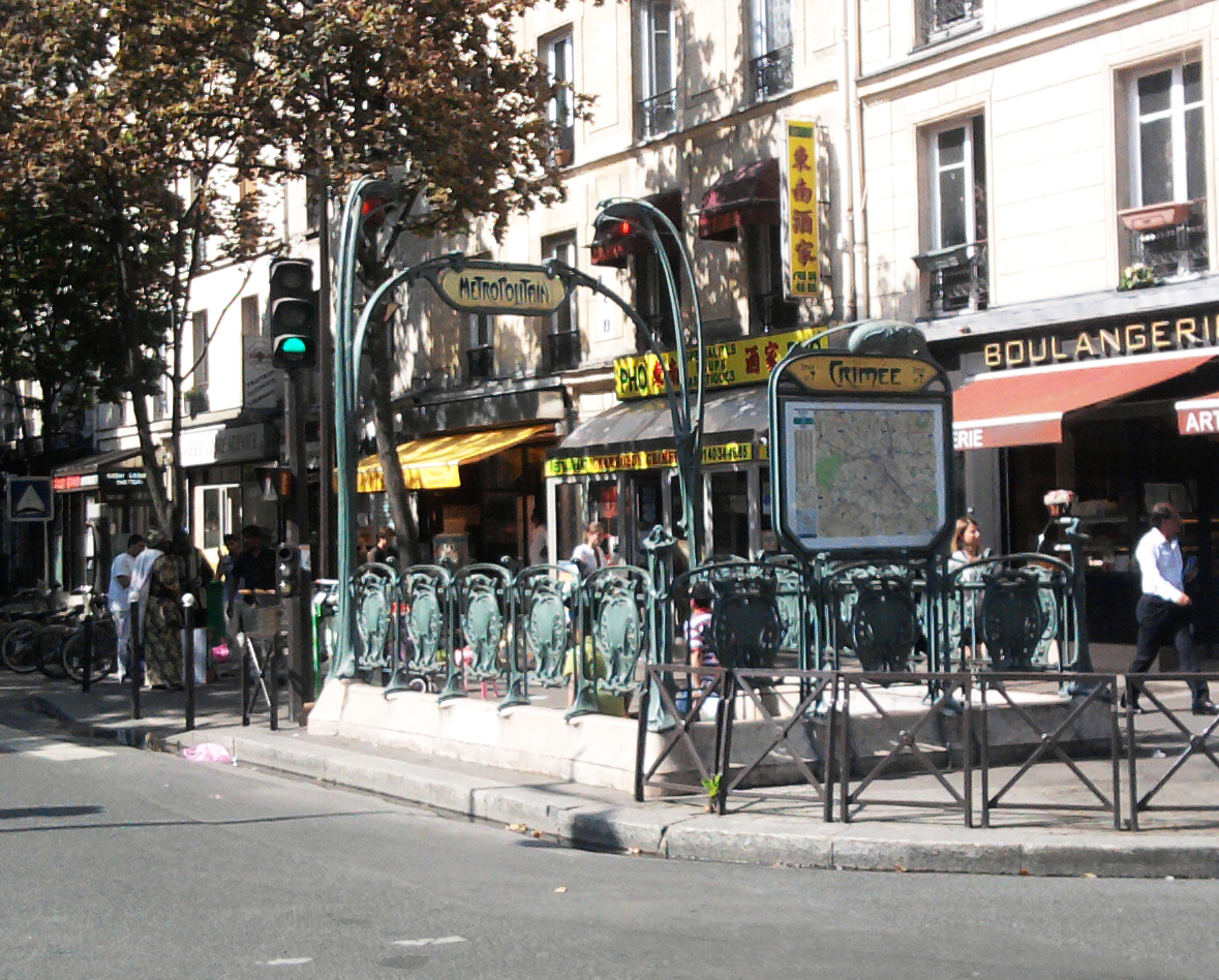 185 rue de Crimée .